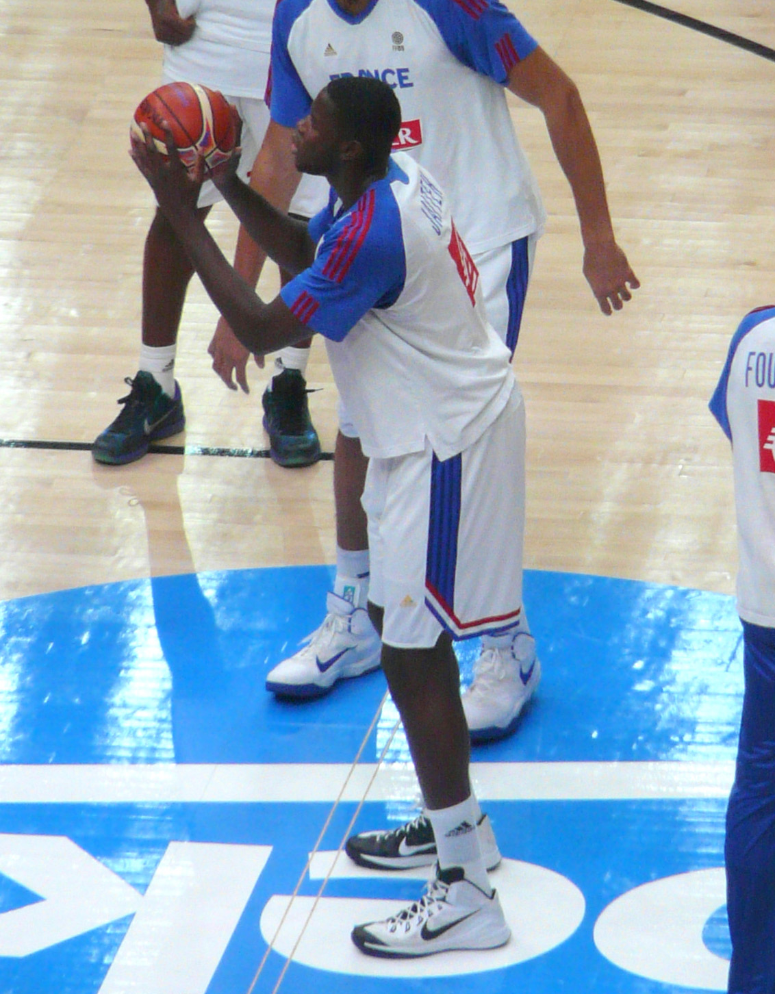 Baloncestista francés